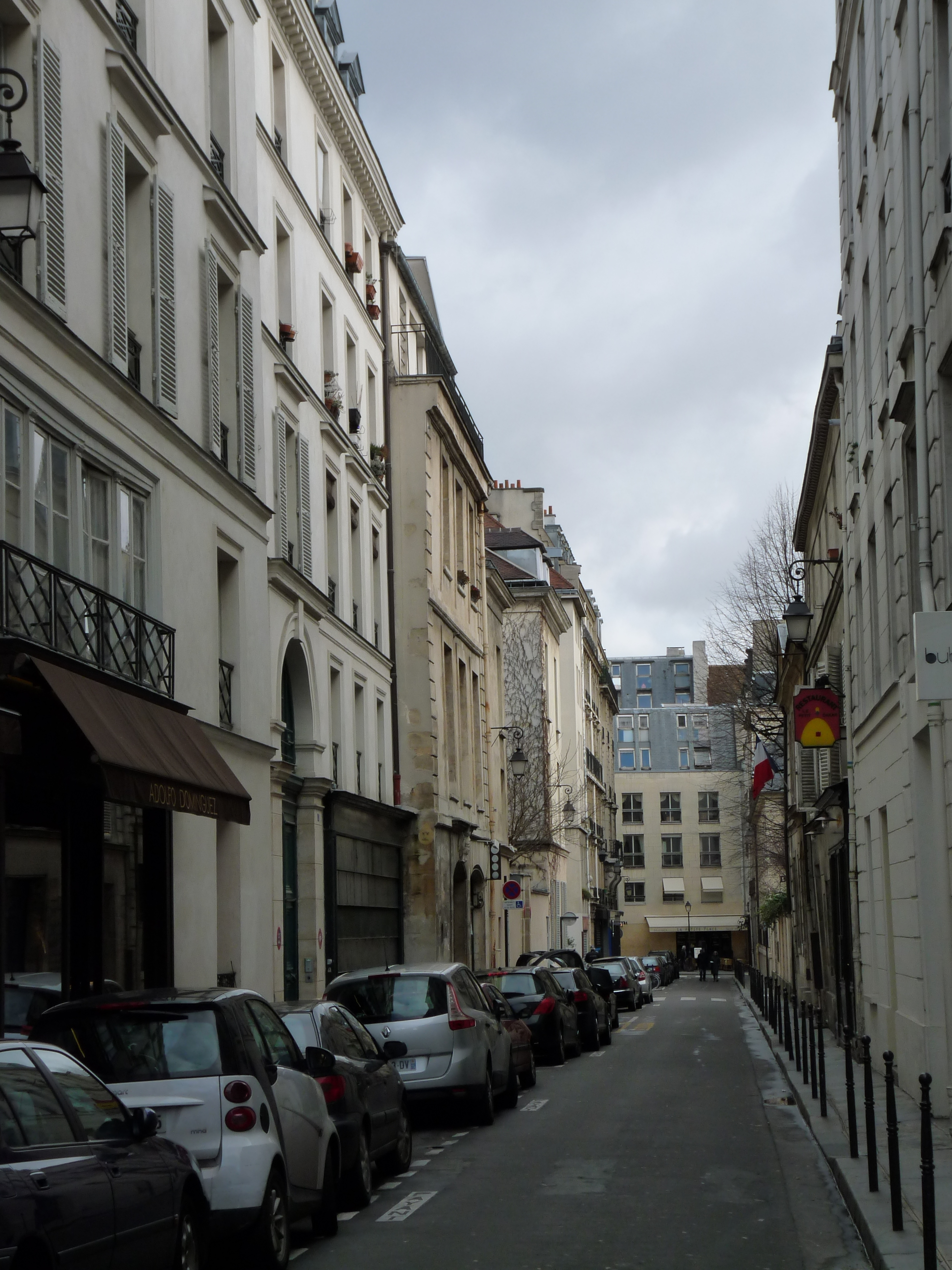 La rue Elzevier à Paris, vue depuis la rue des Francs Bourgeois.